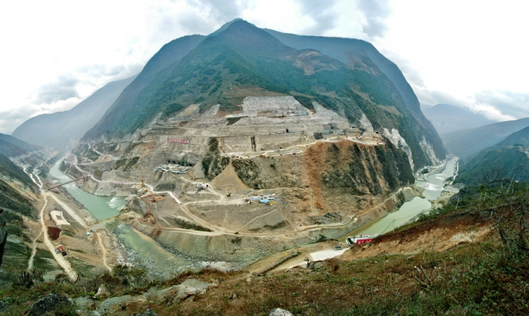 施工现场